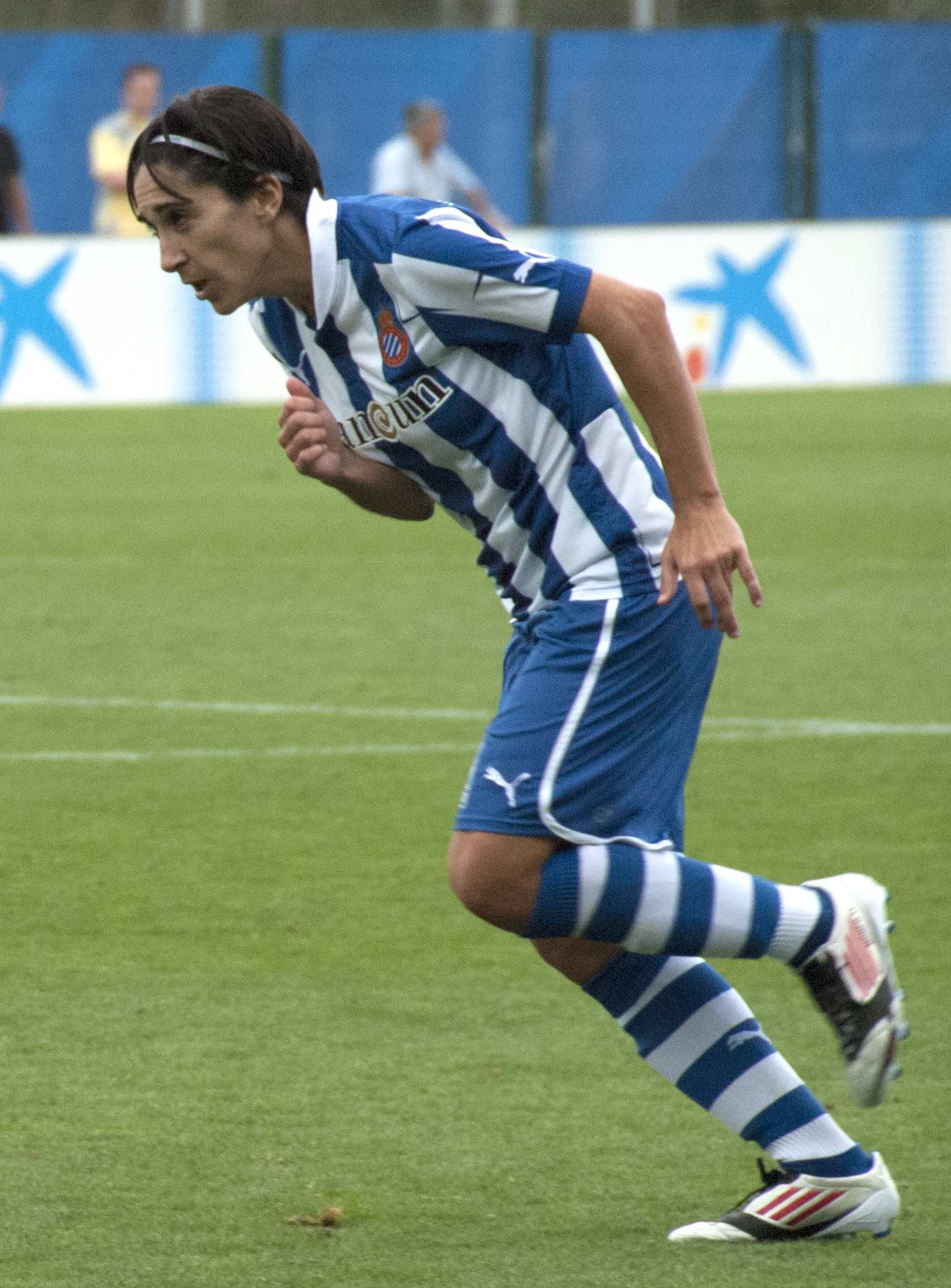 RCDE 2 - 0 FCB